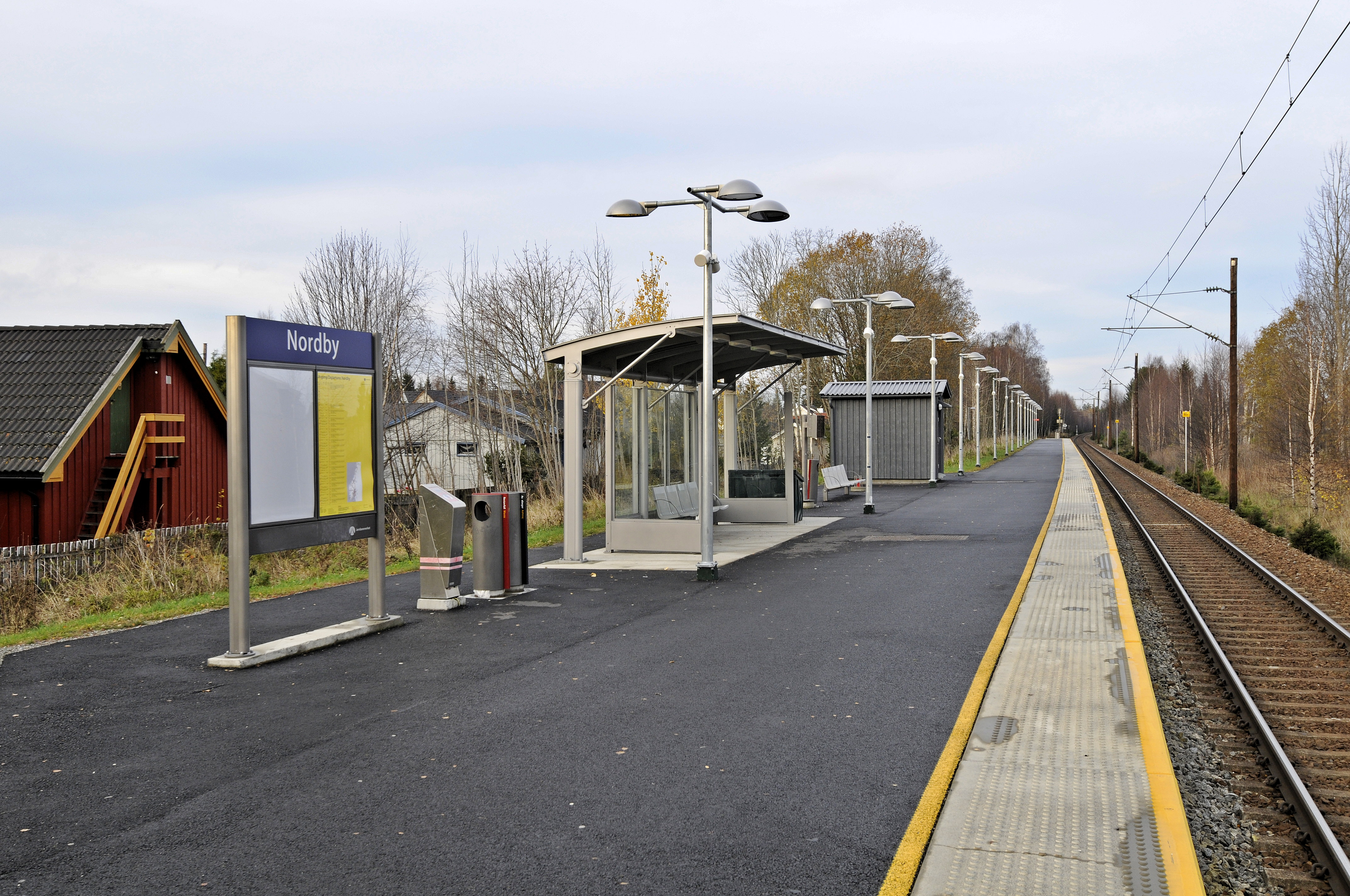 Nordby stasjon på hovedbanen på Jessheim